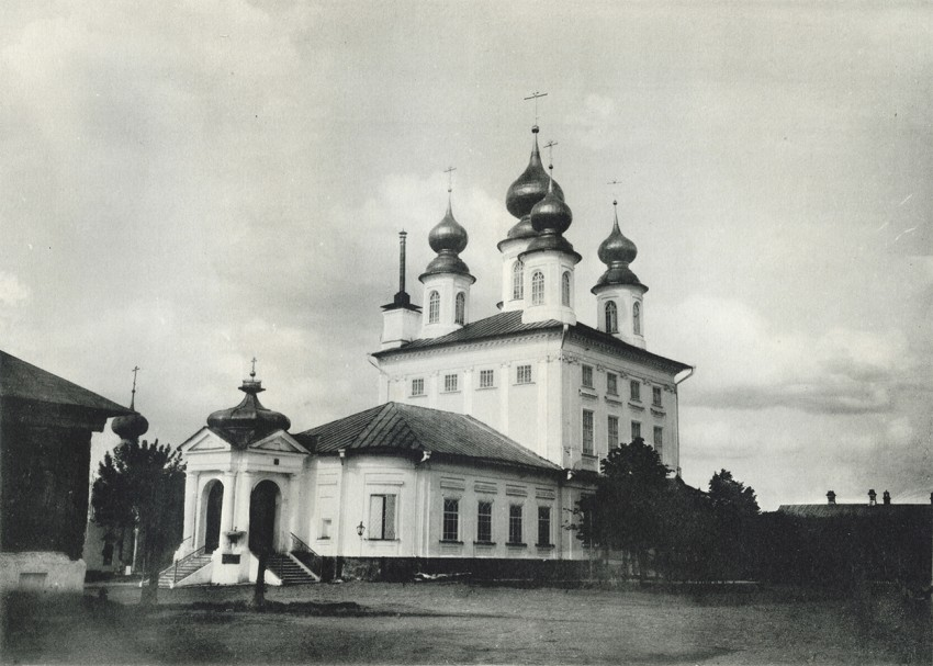 Воскресенский собор в Шуе до перестройки западного притвора. Фото 1905